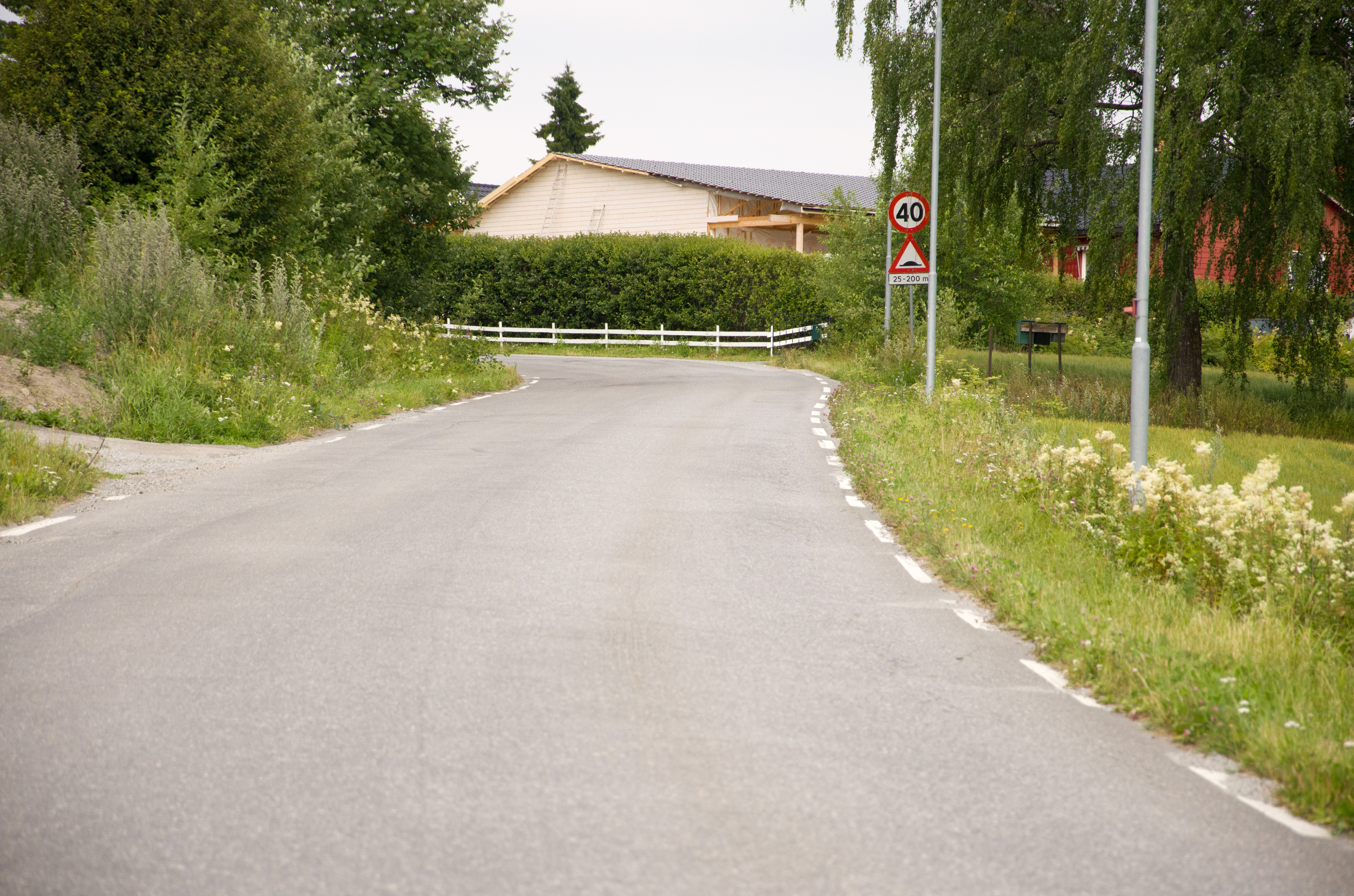 Fylkesvei 1740 (tidl. 70) Vienvegen